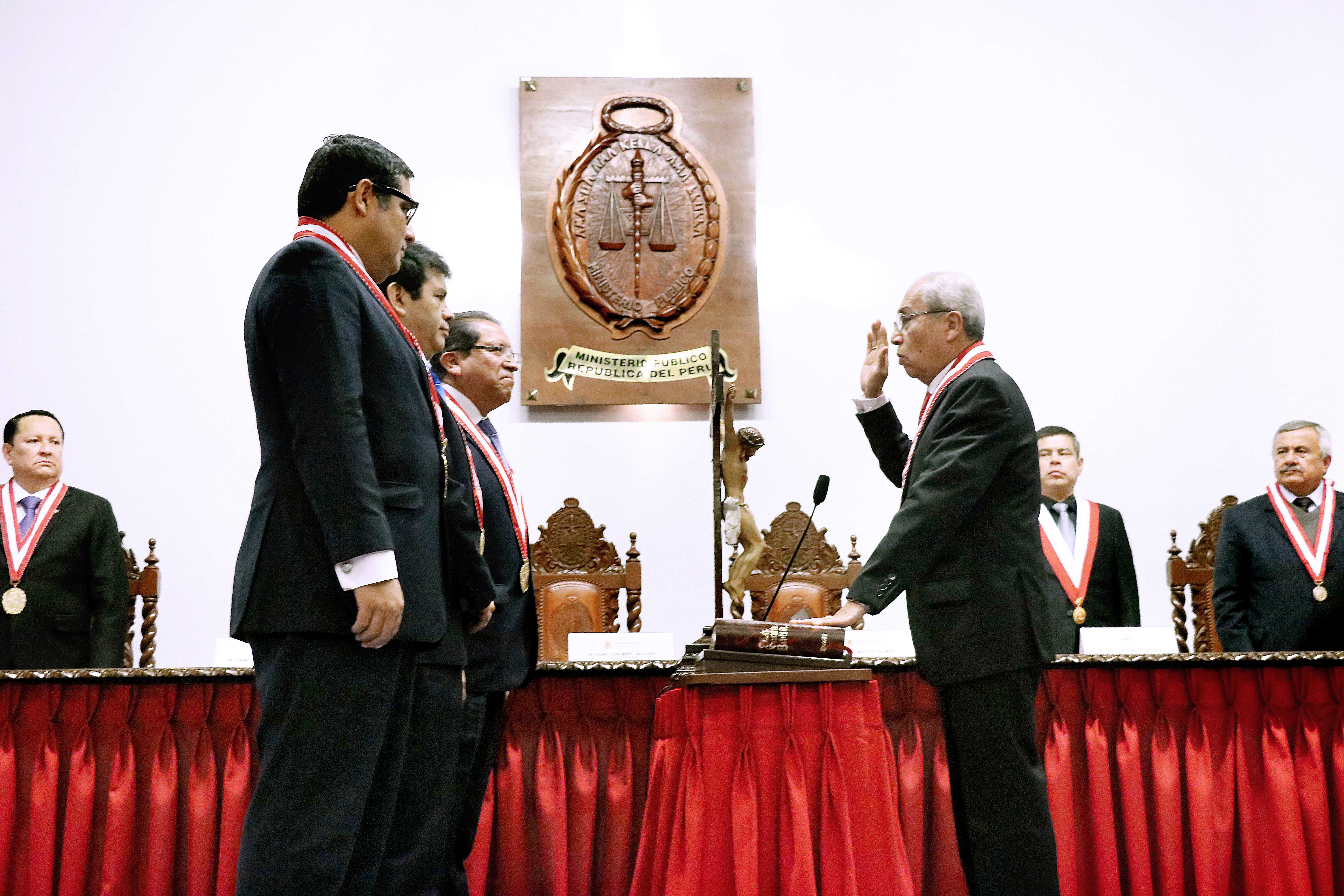 Ceremonia de juramentación del Dr. Pedro Gonzalo Chavarry Vallejos como Fiscal de la Nación para el periodo 2018 - 2021